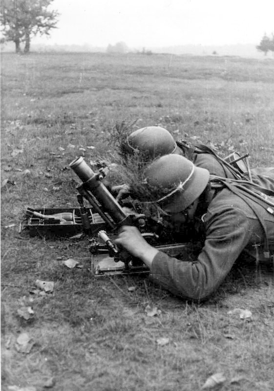 Soldaten am leichten Granatwerfer Scherl Bilderdienst Die Artillerie der Zugführer [1942] Aufnahme: Regiment Großdeutschland 6453-42 [Übung ? zwei Soldaten, getarnt auf freiem Feld liegend, beim Bedienen eines leichten Grantwerfers 36,]